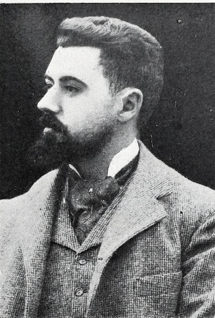 D. Santiago Alba. Secretario de la Comisión Permanente de las Cámaras de Comercio.